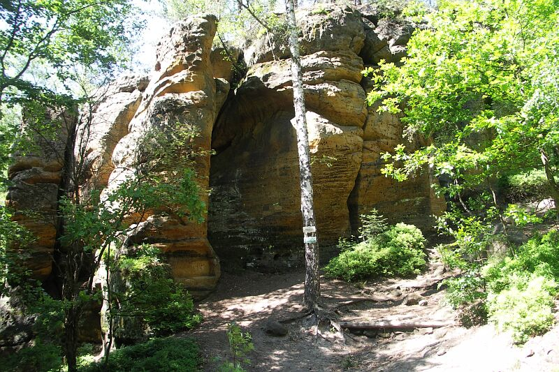 Rocks in Modlivý důl, Czech Republic